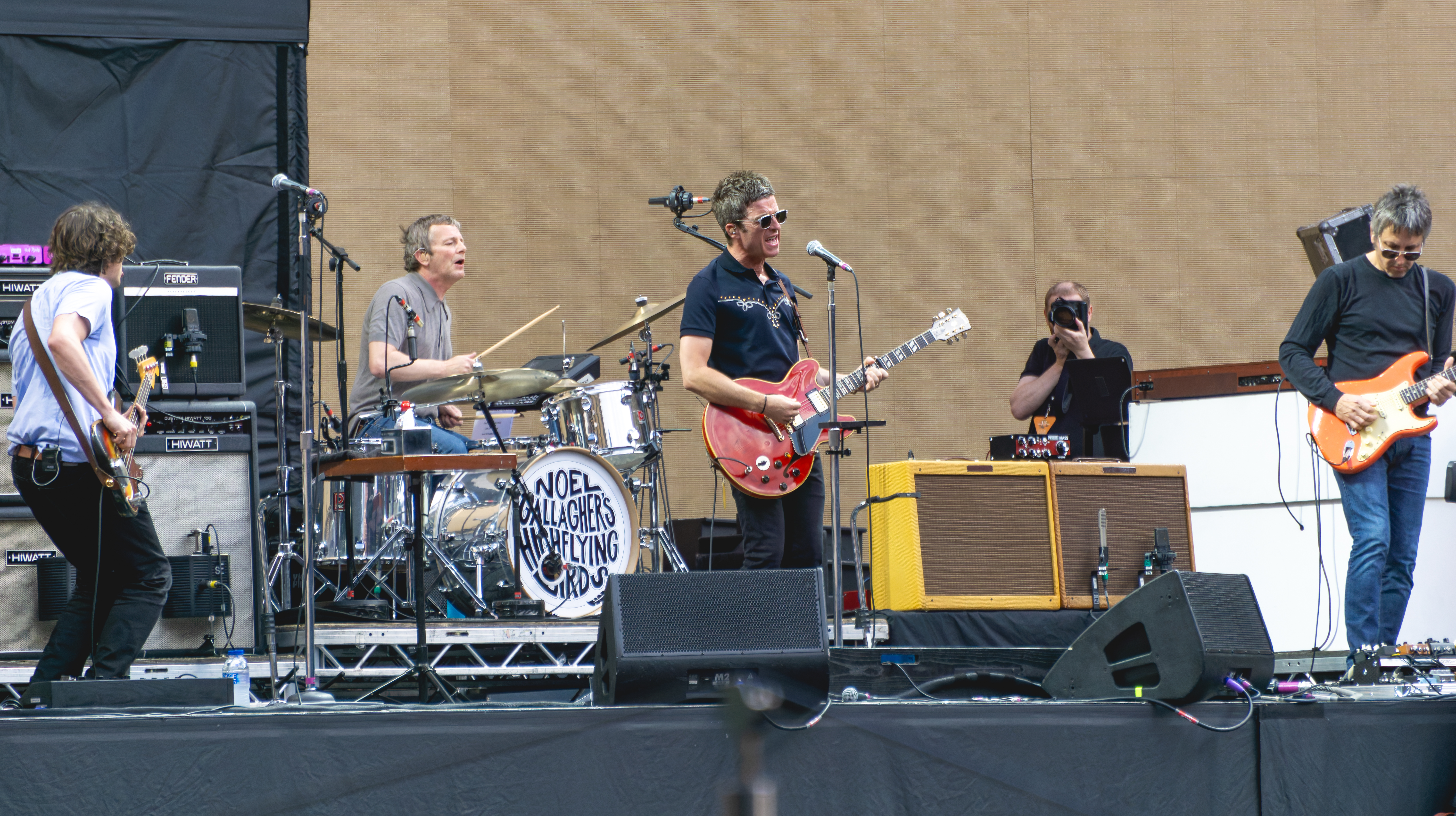 U2Twick090717-3